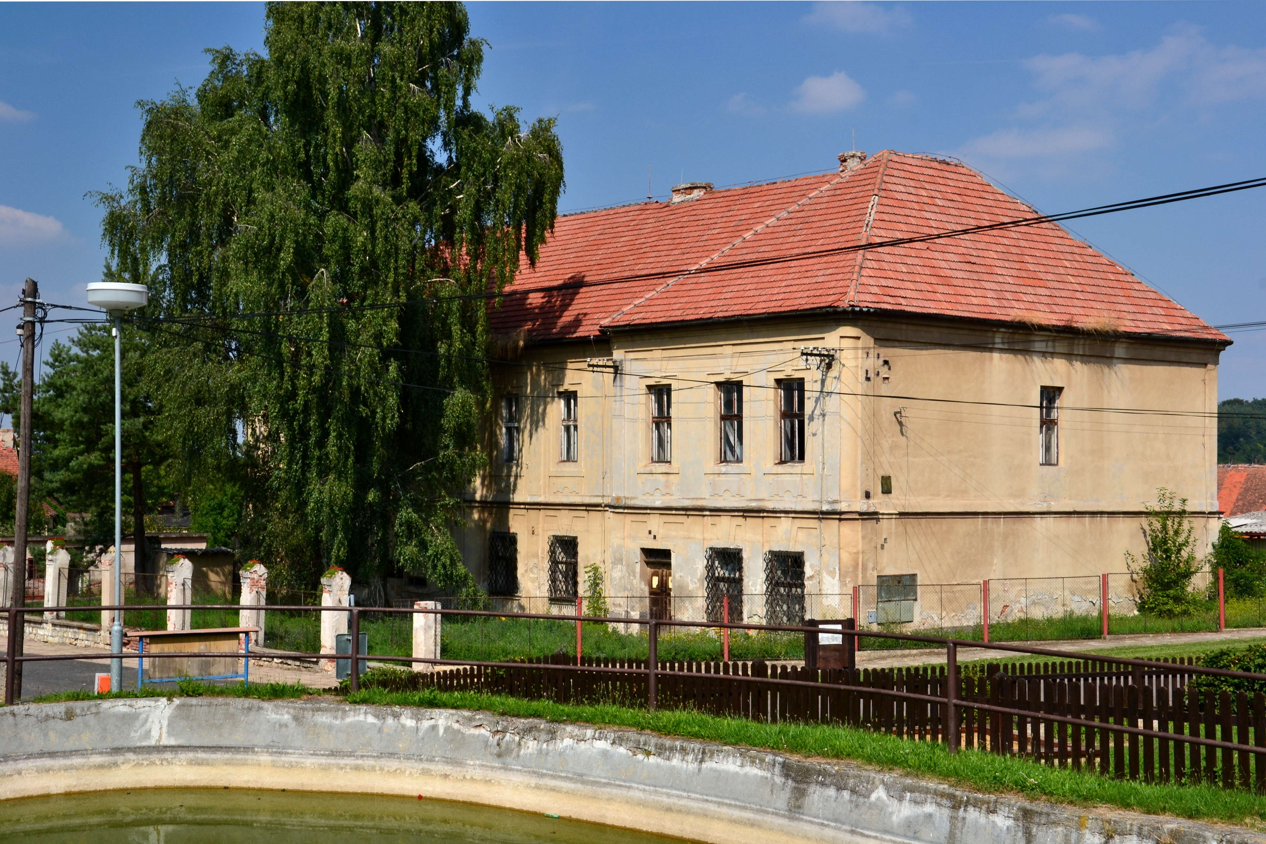 Zámek, s omezením: bez brány Želeč, Želeč 1